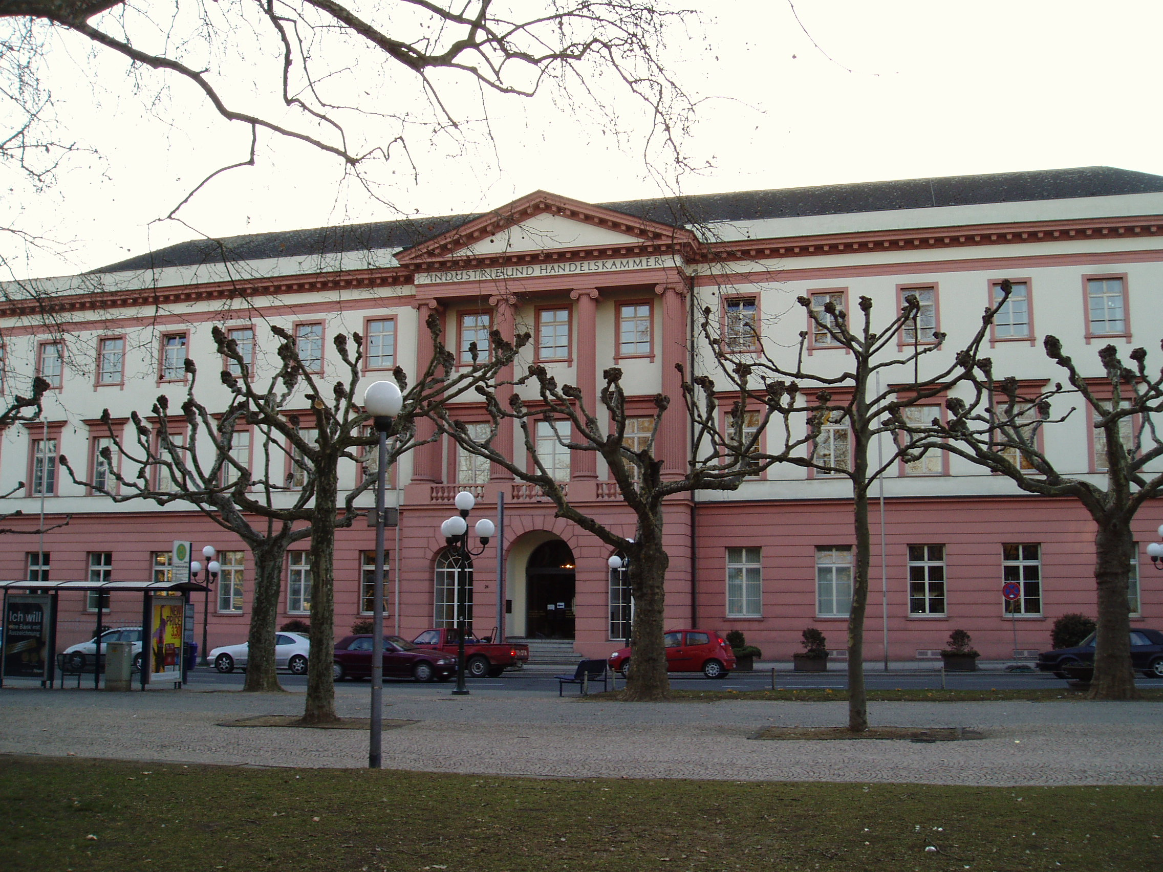 Das Bild zeigt das klassizistische Erbprinzenpalais an der Wilhelmstraße in Wiesbaden. Das Bild wurde aufgenommen von der gegenüberliegenden Parkanlage Warmer Damm.